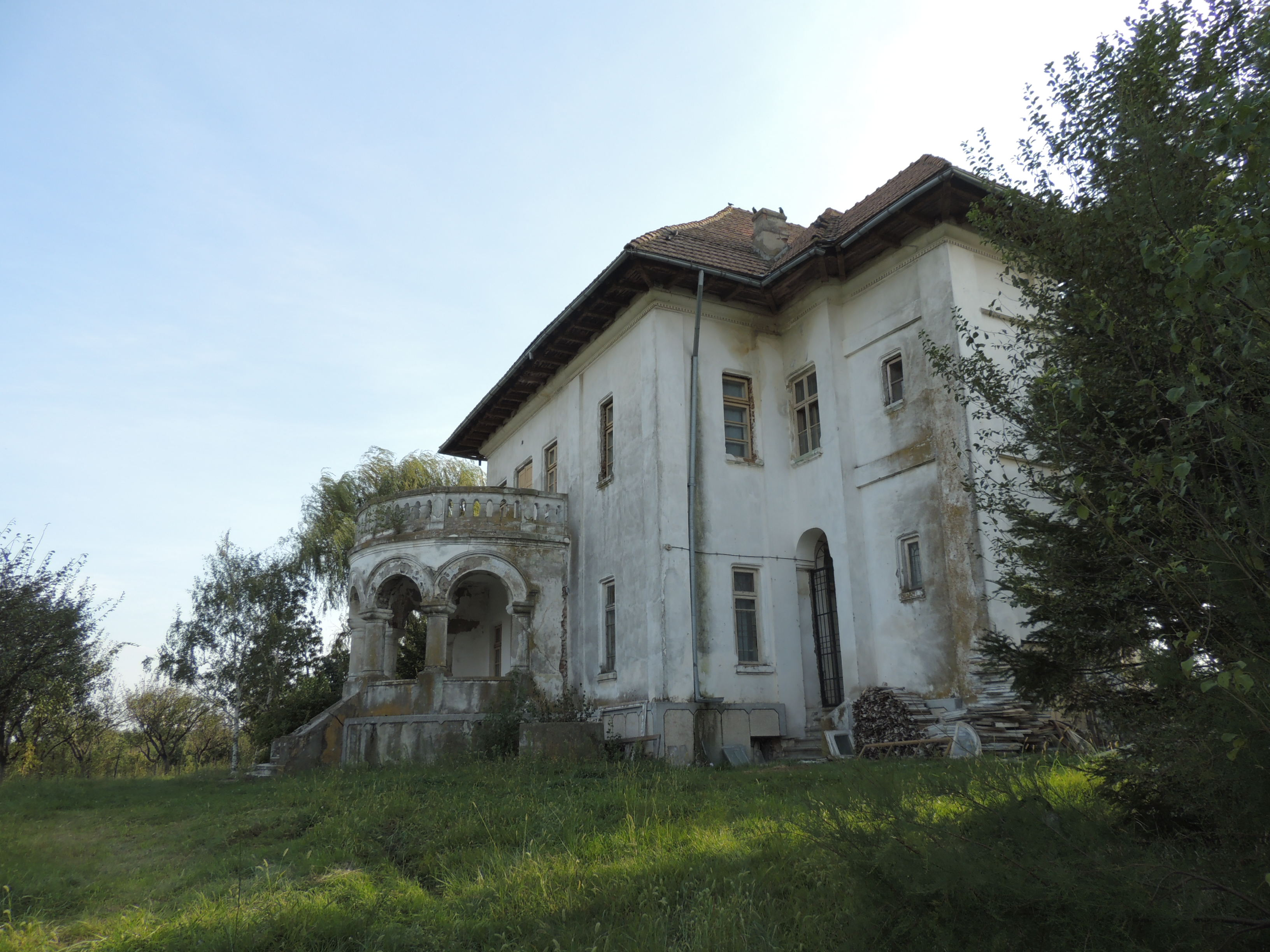 Vedere Nord-Est